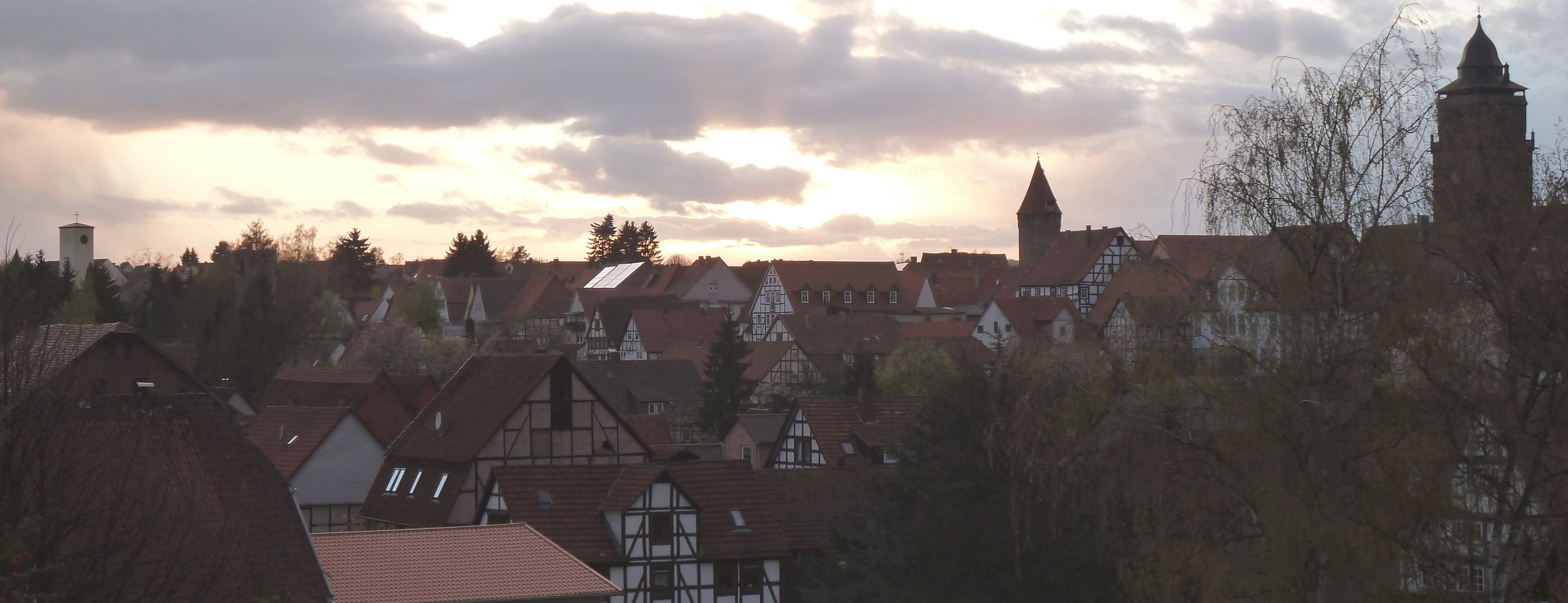 Grebensteiner Altstadt, ev. Kirche, kath. Kirche, Jungfernturm